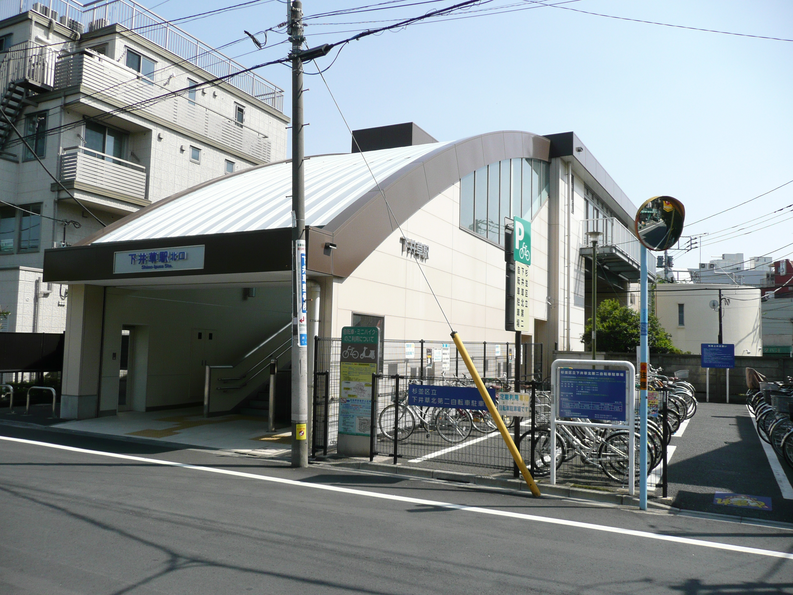 下井草駅北口